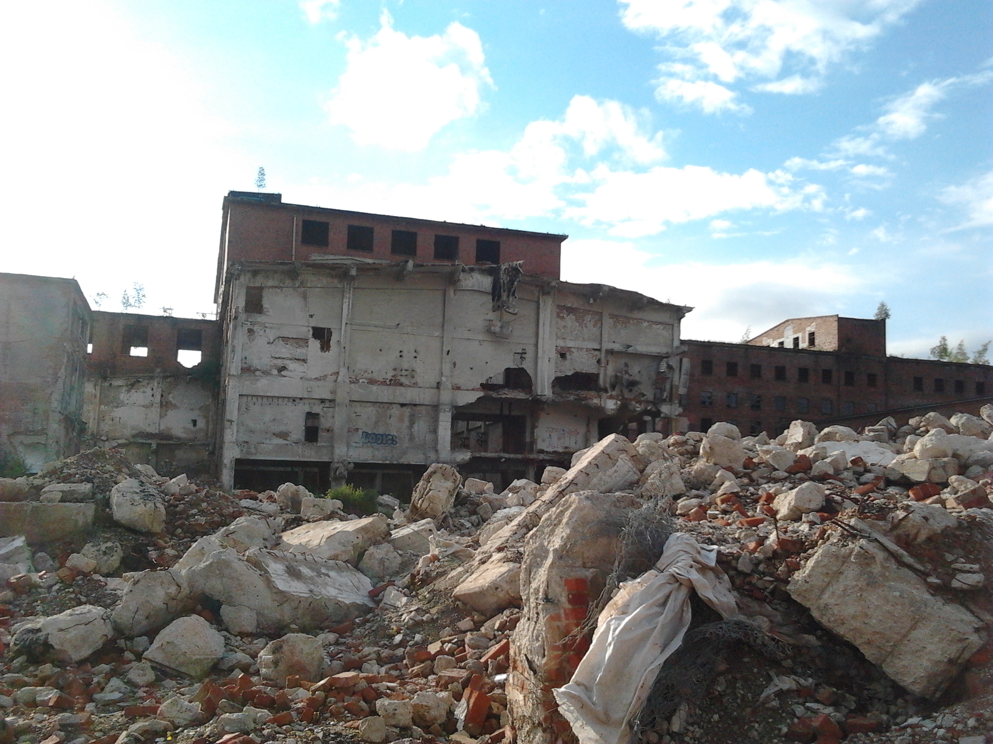 Gruzy przy Celwiskozie, wejście od strony Jelenia-Plast